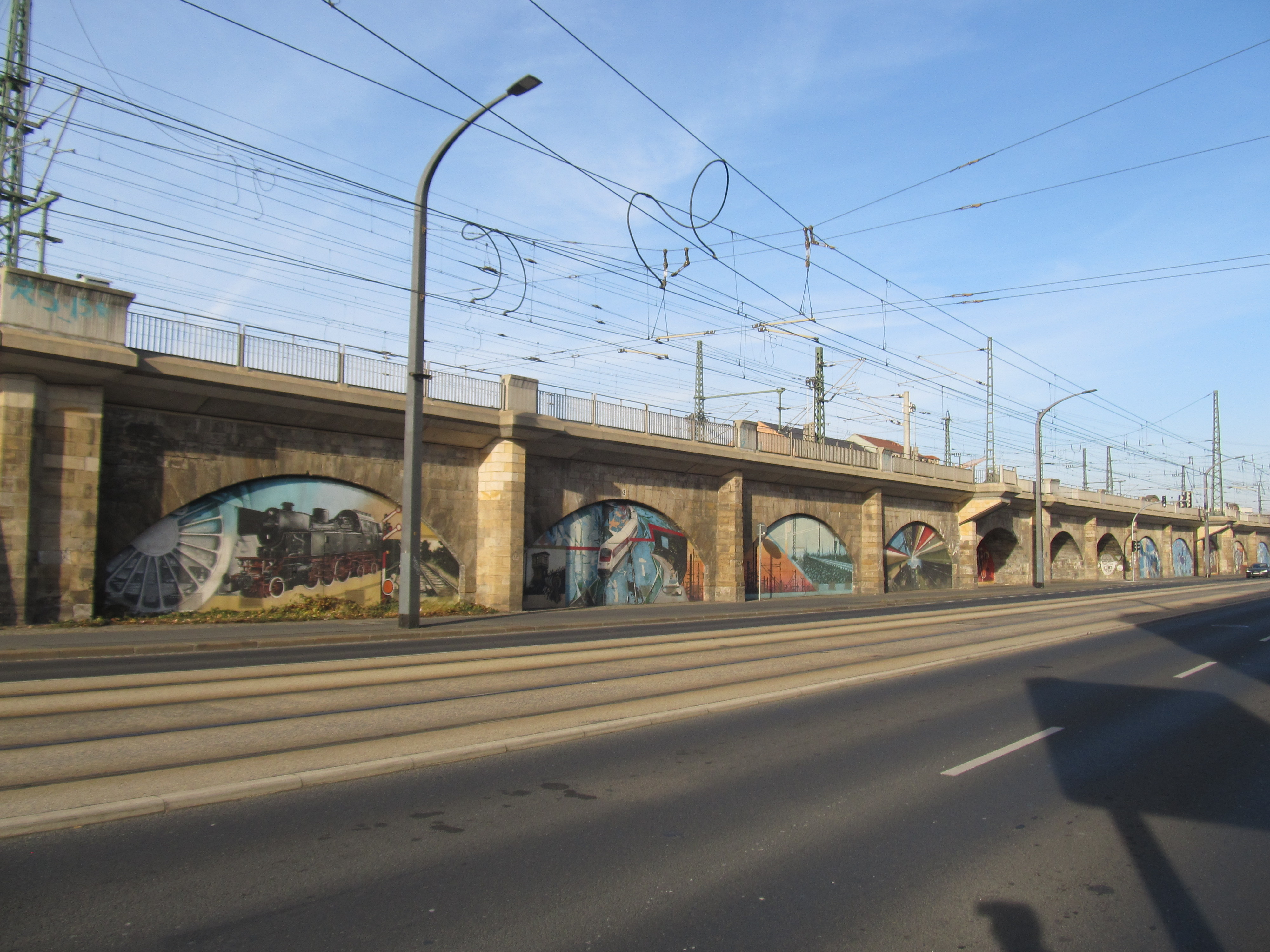 Teile I und II der Bahnbögengalerie an der Könneritzstraße, Dresden, Sachsen, Deutschland